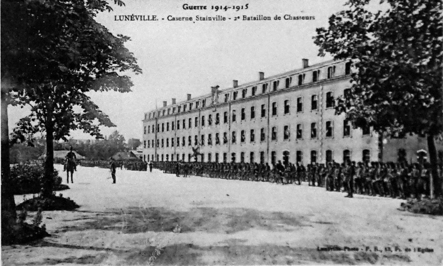 au musée de Toul.